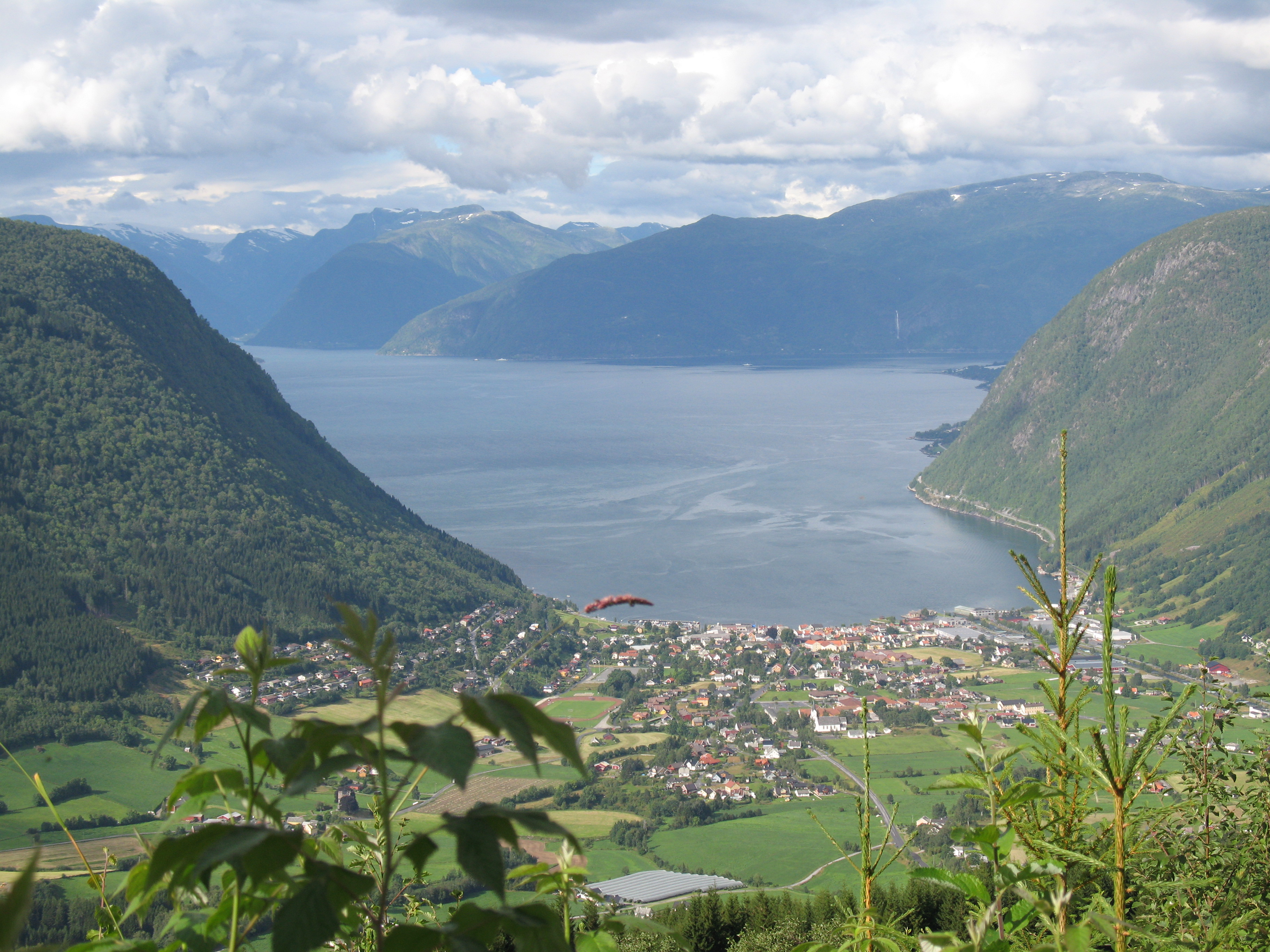 Vik - Norwegen